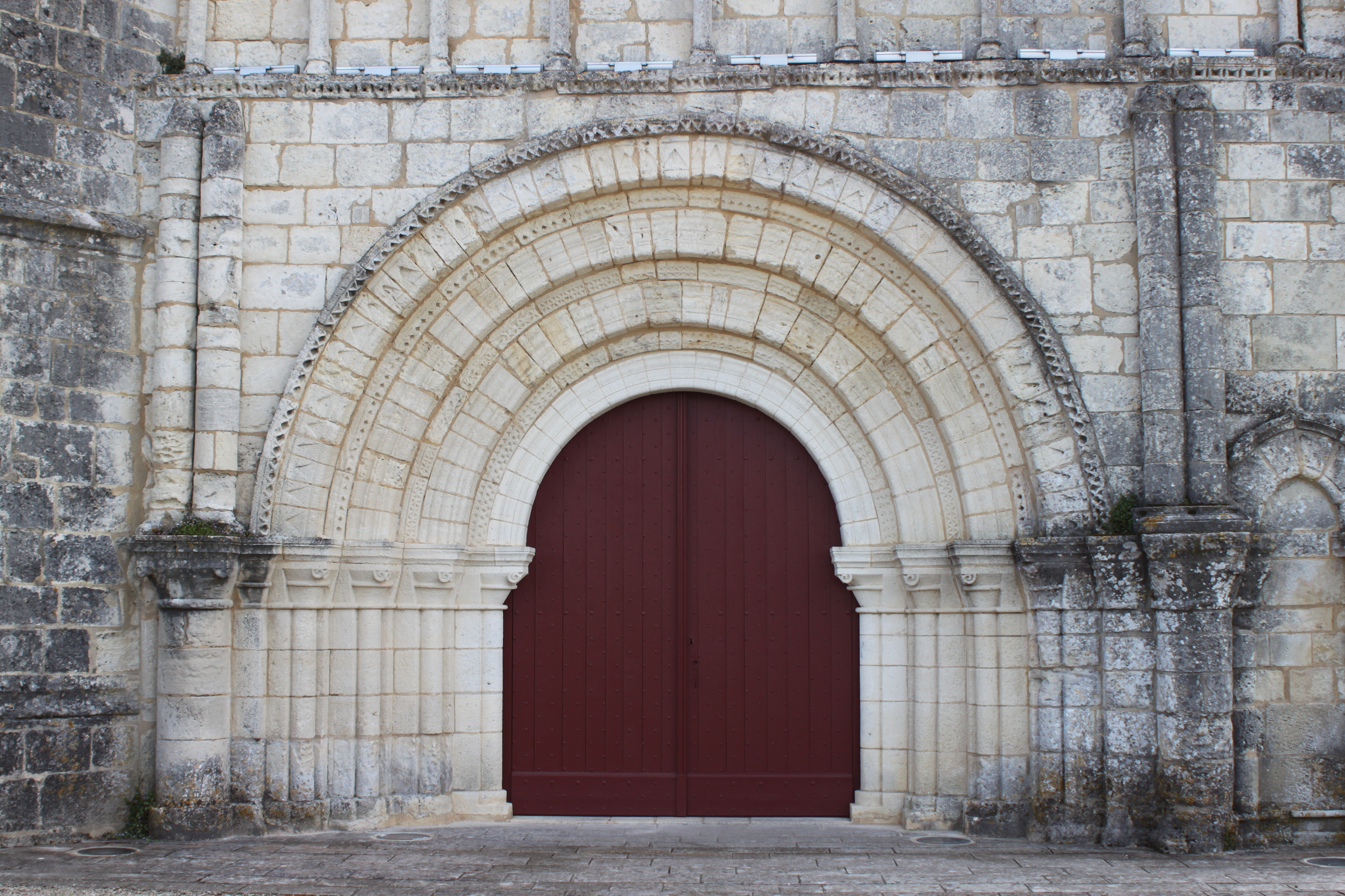 Portail de l'Église Saint-Vivien, Fr-17-Breuillet.